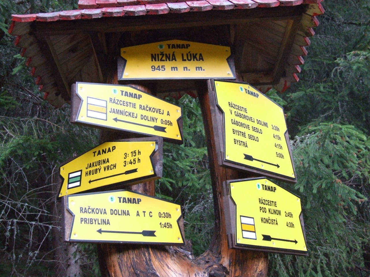 Rozdroże na Otargańce w Nizniej Łące (tabliczki turyst.)